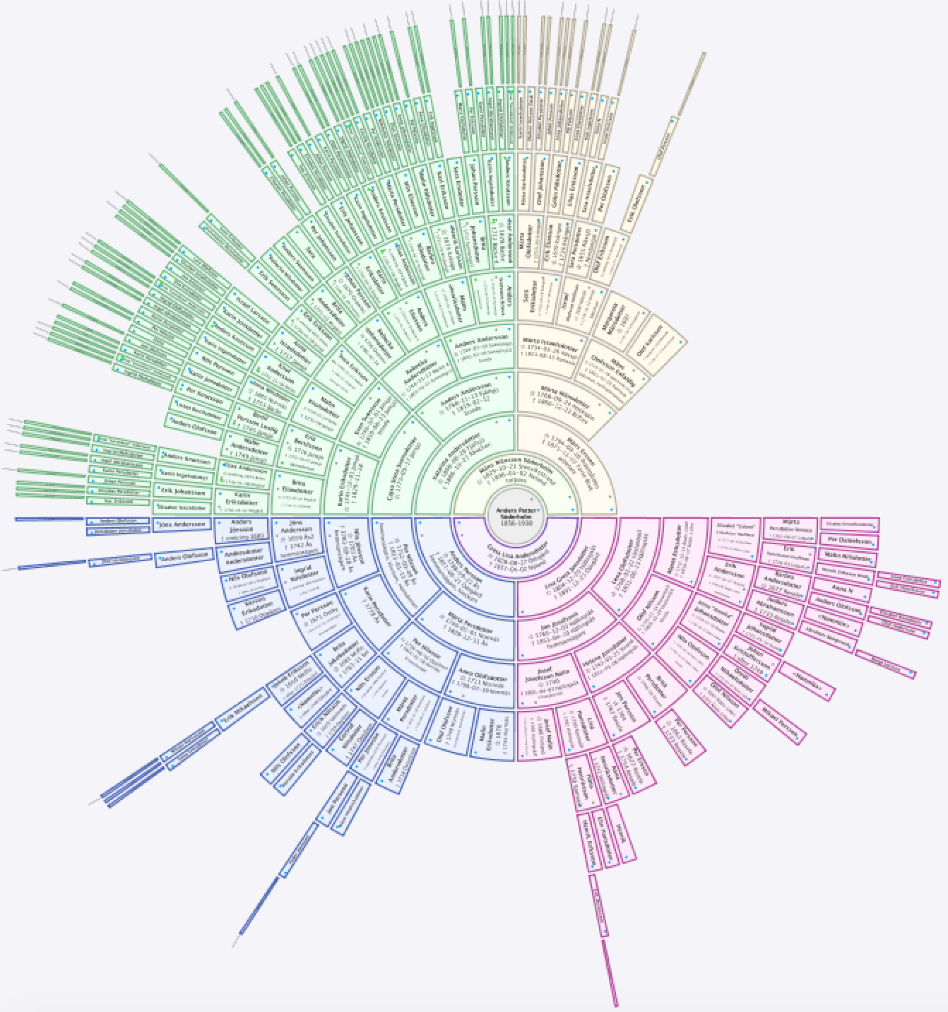 Cirkeldiagram över anor